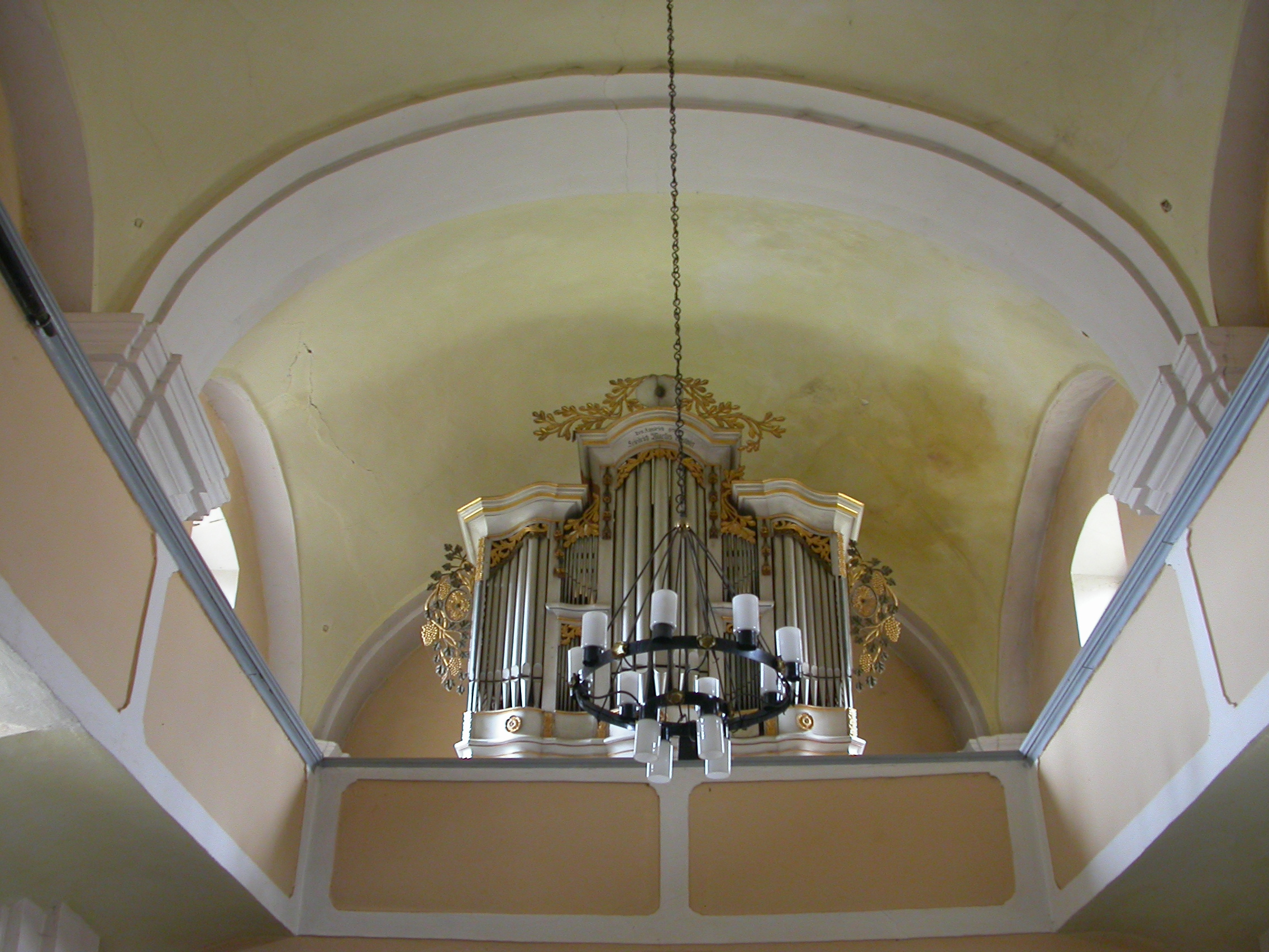 Biserica evanghelică, sec. XIV - XVIII,1806 (turn-clopotniță)